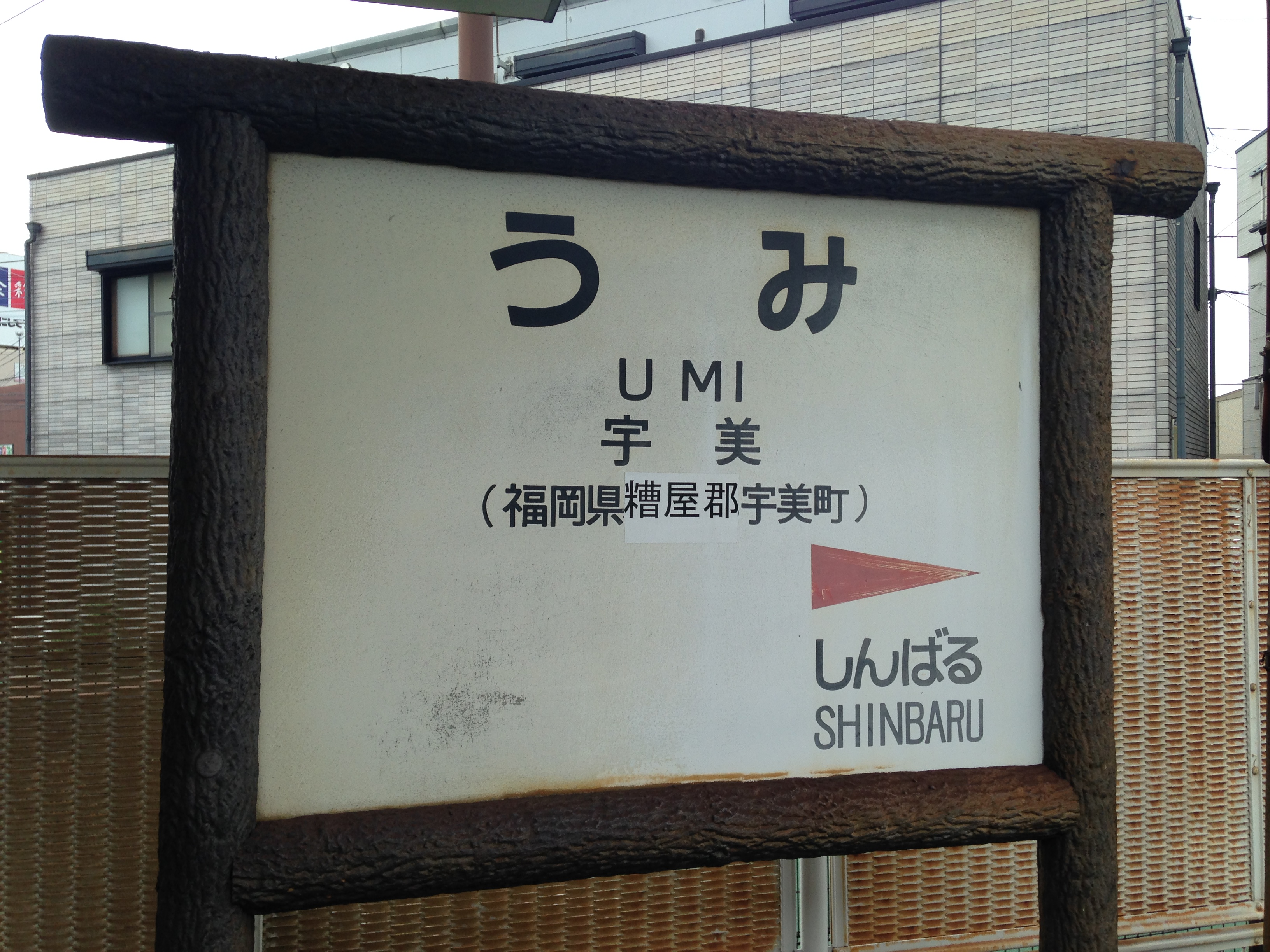 宇美駅の駅名標